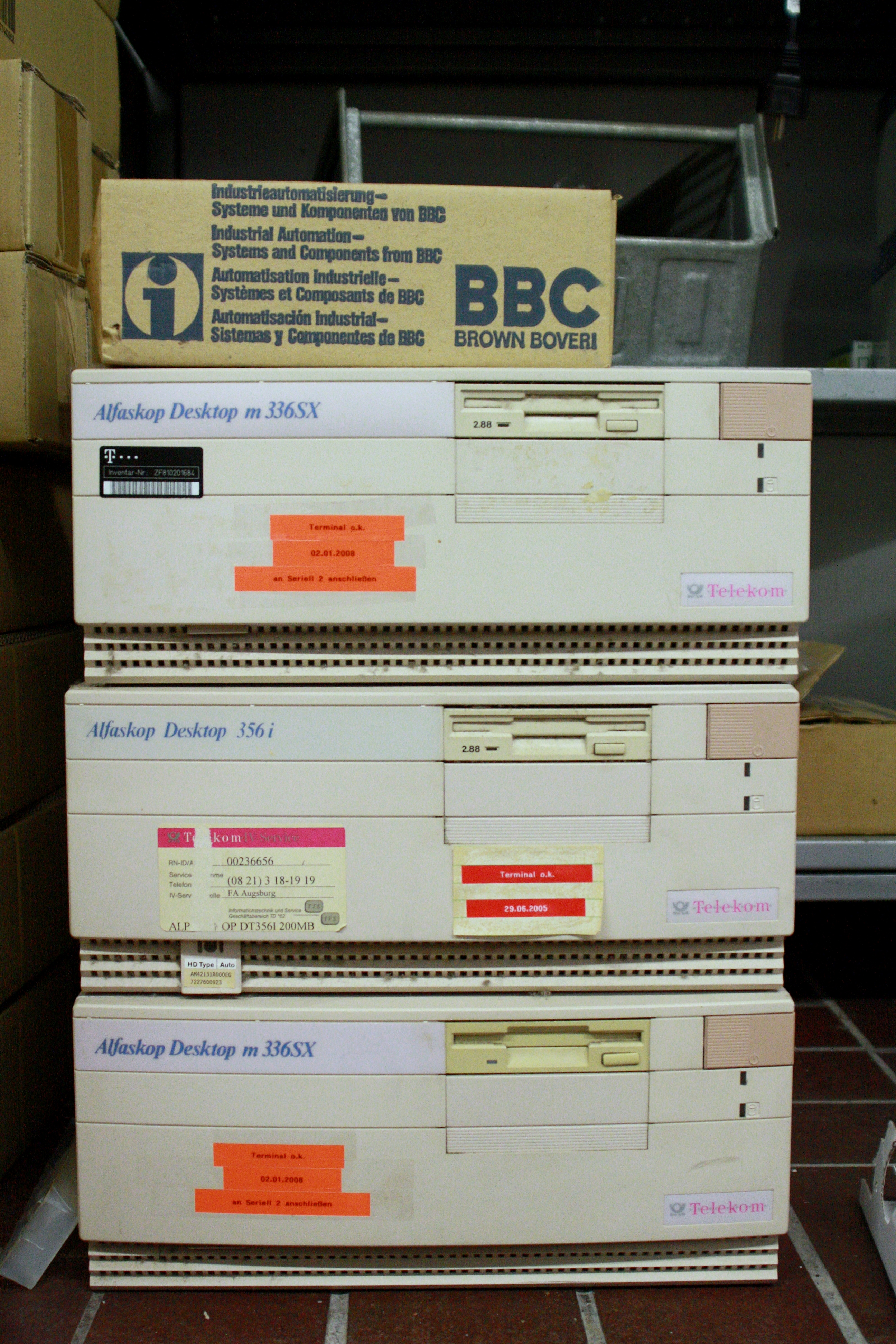 Kurzwellensendeanlage Wertachtal - Rückbau im April 2015, Alfaskop Terminalrechner